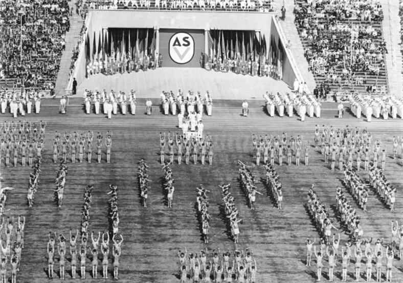 Leipzig, Turn- und Sporttreffen, Massenübung Zentralbild Schlegel Son-Noa 21.7.1957 Turn- und Sporttreffen der Jugend in Leipzig. Am letzten Tag des Turn- und Sporttreffens der Jugend in Leipzig wurden am Nachmittag die Vorführungen der Massenübungen der Kinder sowie der Sportlerinnen und Sportler des Bezirkes Leipzig und die Vorführungen der Sportvereinigung Dynamo und Vorwärts im Zentralstadion gezeigt. Besondere Begeisterung fanden die Massenübungen der Kinder, die erstmalig bei einem Sporttreffen in diesem grossen Umfange aufgezogen worden sind. UBz: Massenübungen der Armeesportvereinigung.